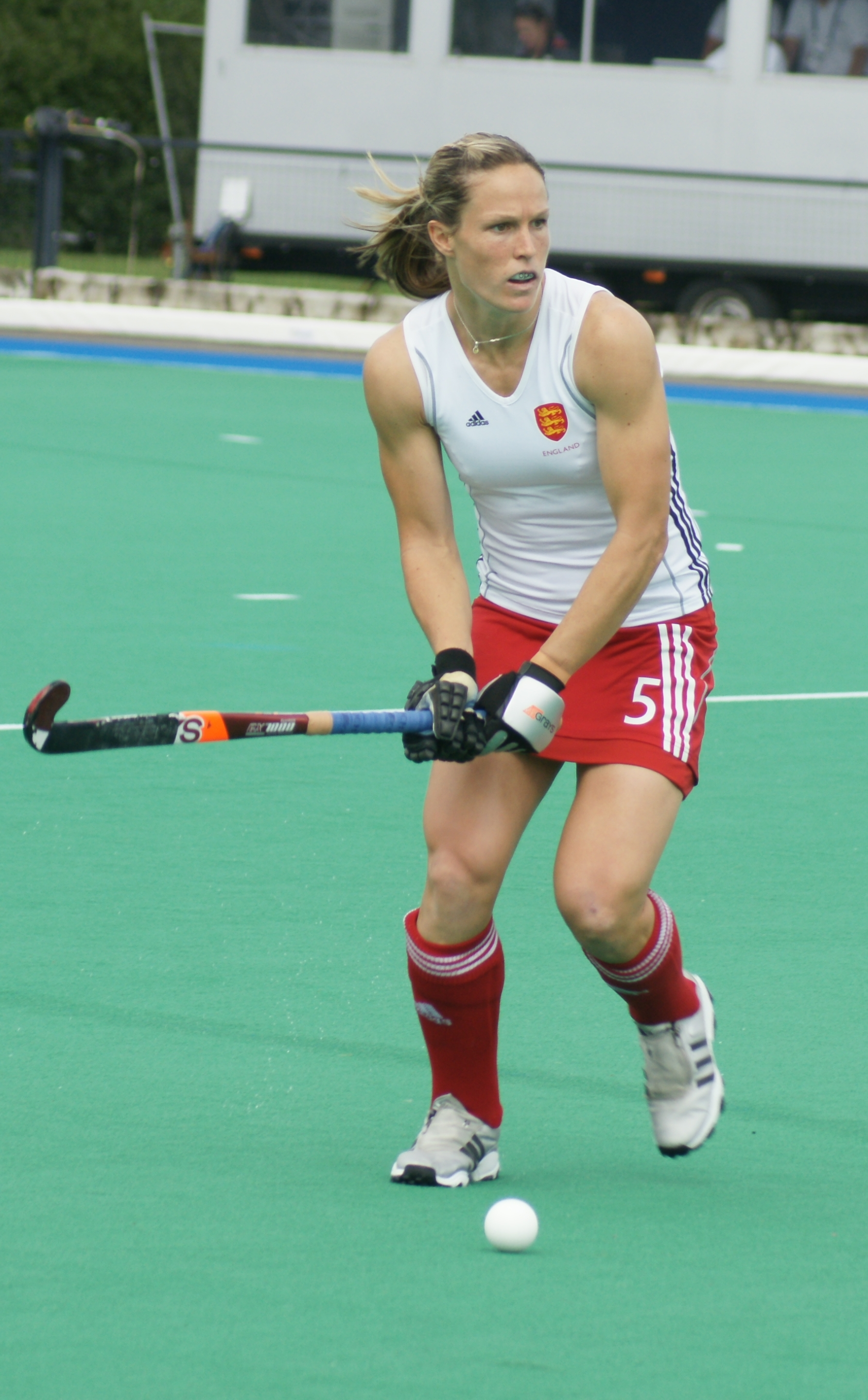 Crista Cullen